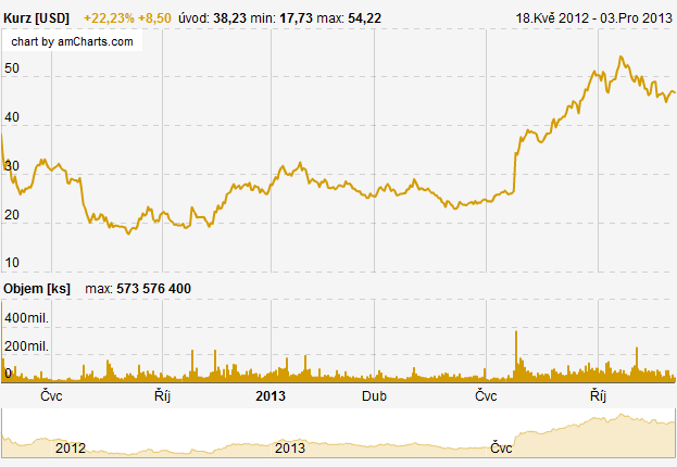 FACEBOOK - Akcie FB, Graf obchodování na Nasdaq, cena, objemy.